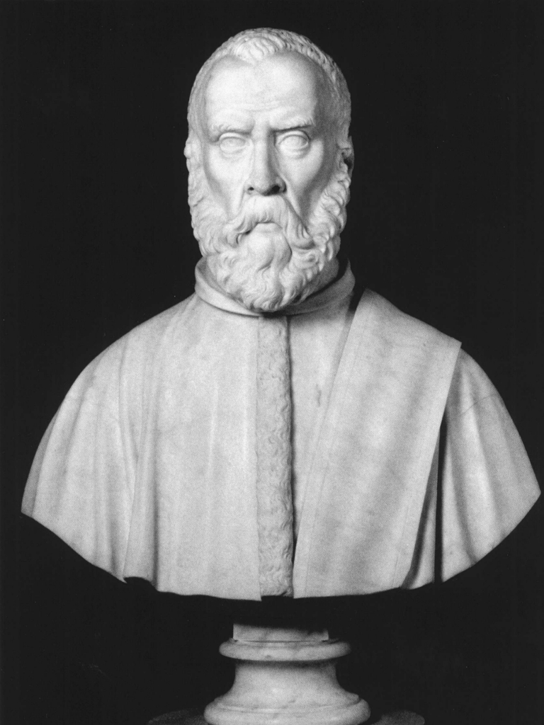 Busto di Tintoretto, opera di Antonio Bianchi del 1858. Il busto fa parte del Panteon Veneto, conservato presso Palazzo Loredan di Campo Santo Stefano a Venezia.